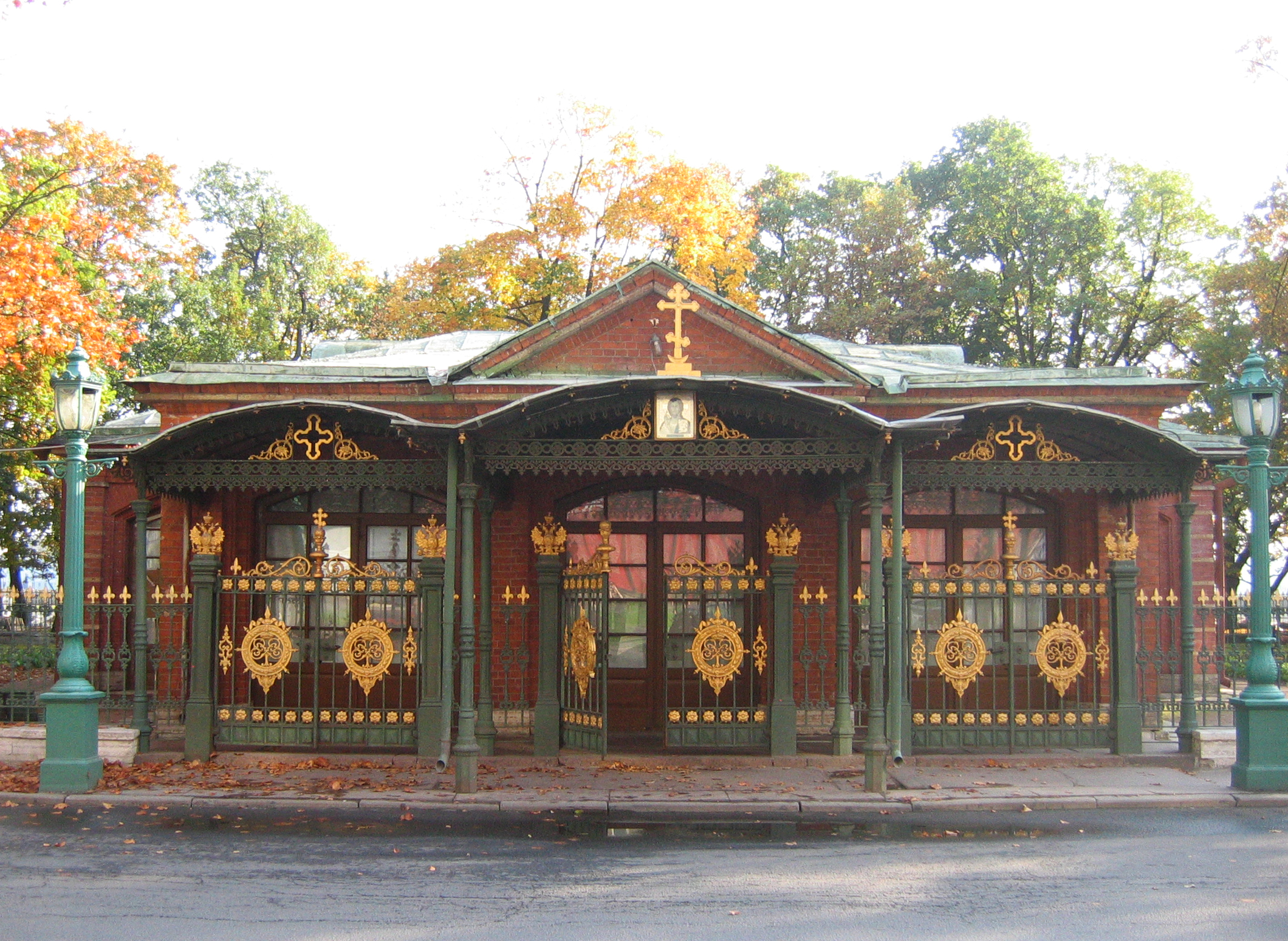 Домик Петра I